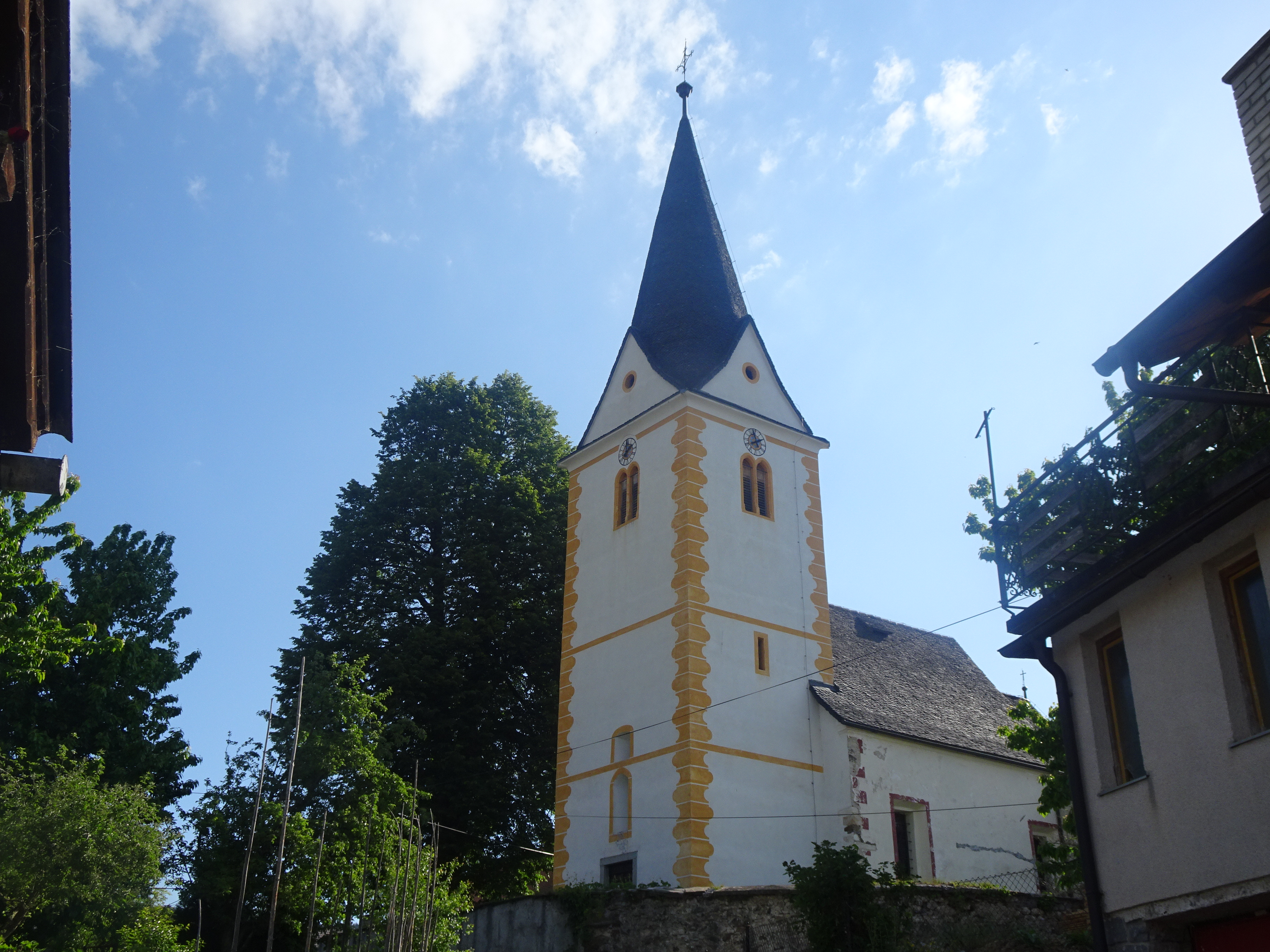 Kebelj, Slovenia